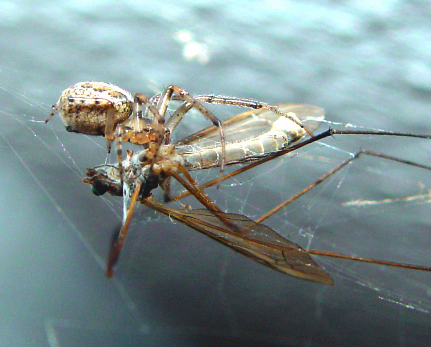 Beschreibung: Spinne beim Fressen einer Schnake Aufnahmedatum: Fotografiert am 31. August 2005 Fotograf: ArtMechanic